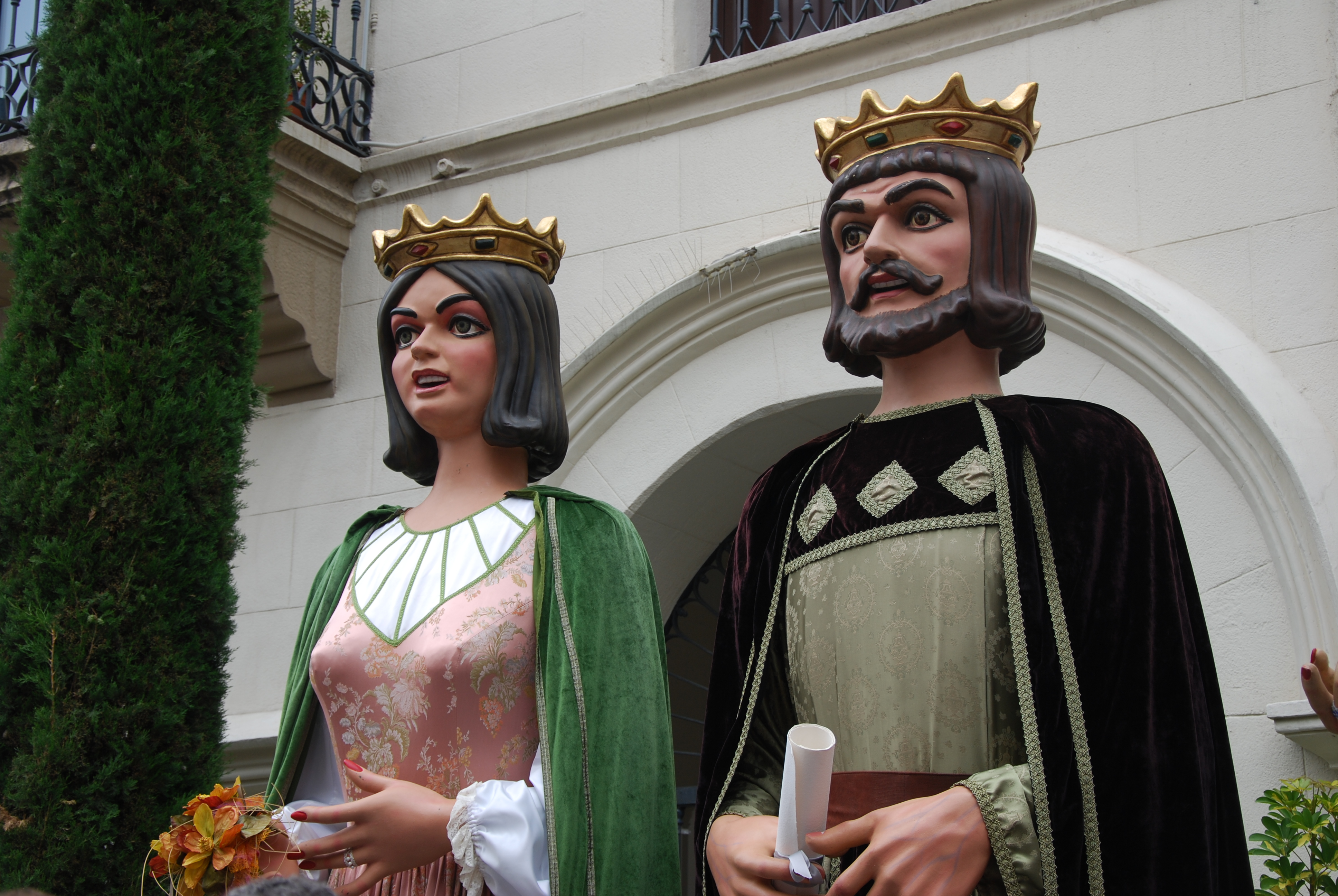 Els gegants Ferrer de Gualbes i Elionor de Sant Climent, de Badalona